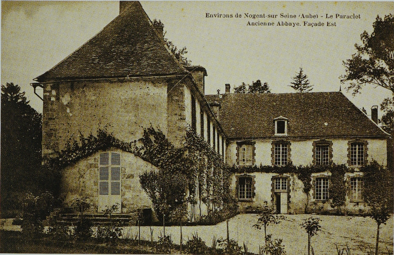 vue du paraclet